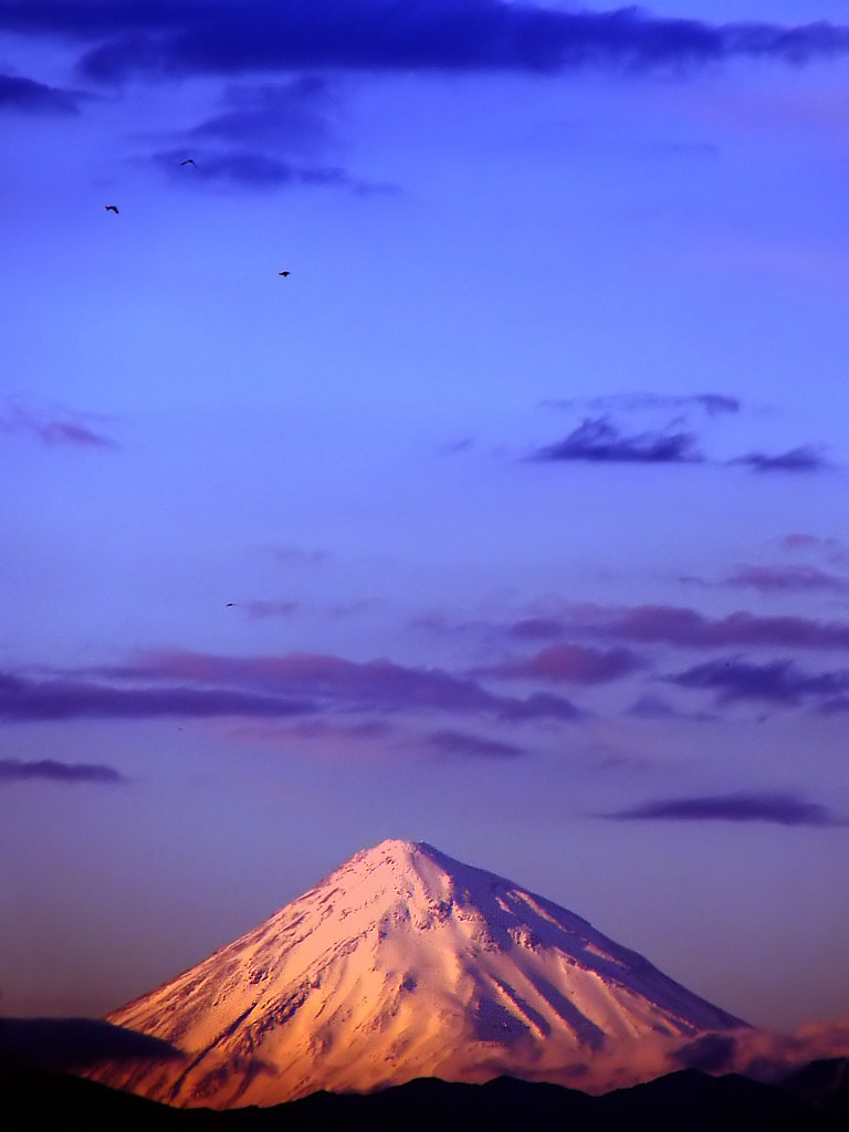 Mount Damāvand